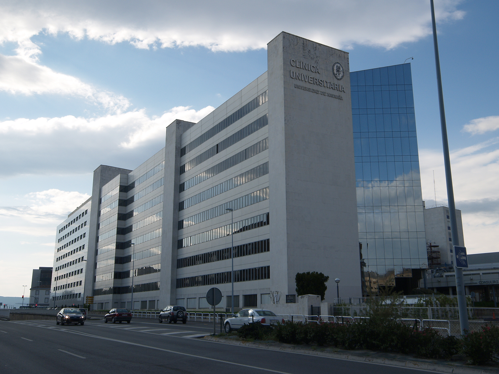 Clínica Universidad de Navarra